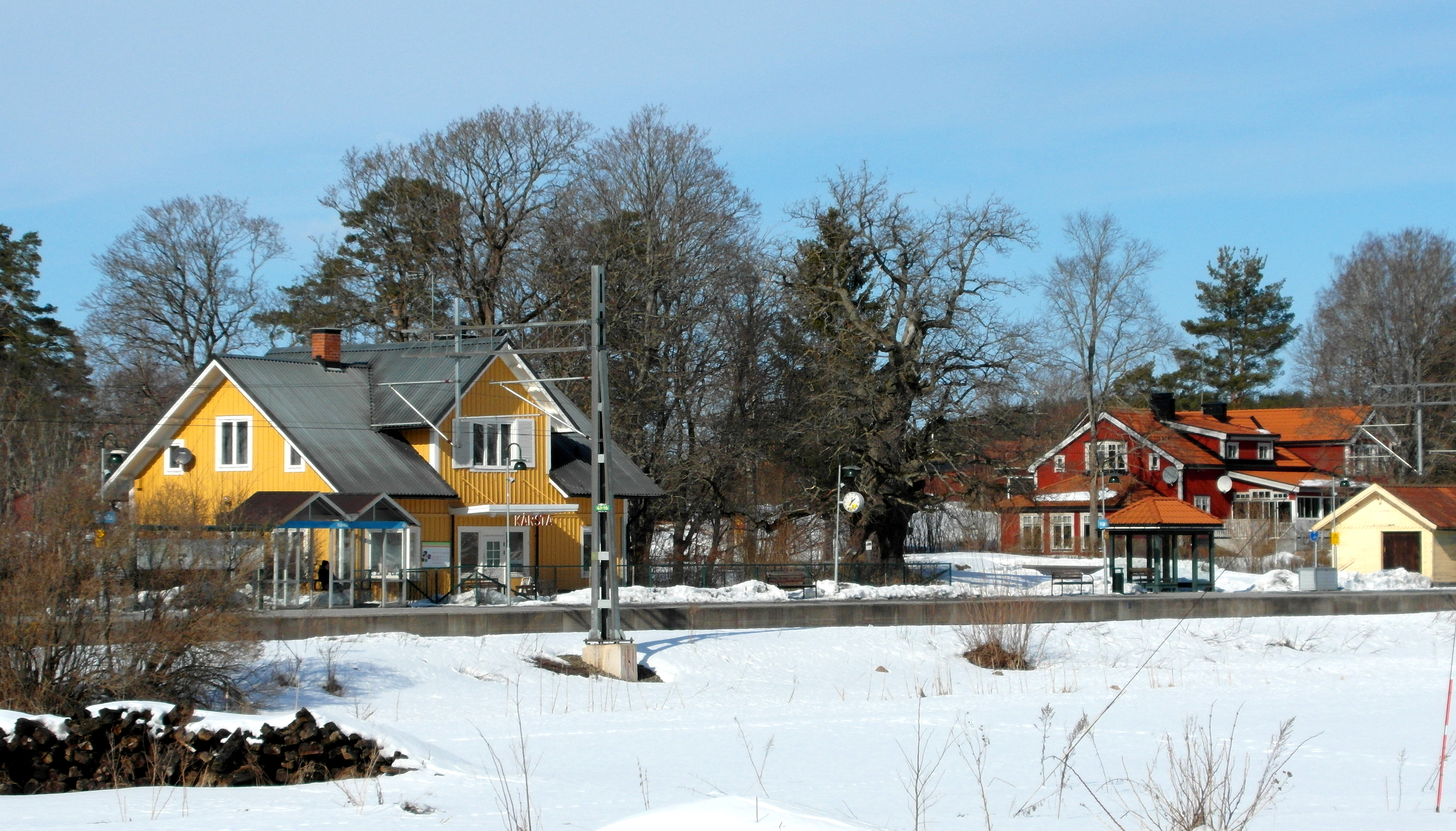 Roslagsbanans stationsområde i Kårsta, Vallentuna